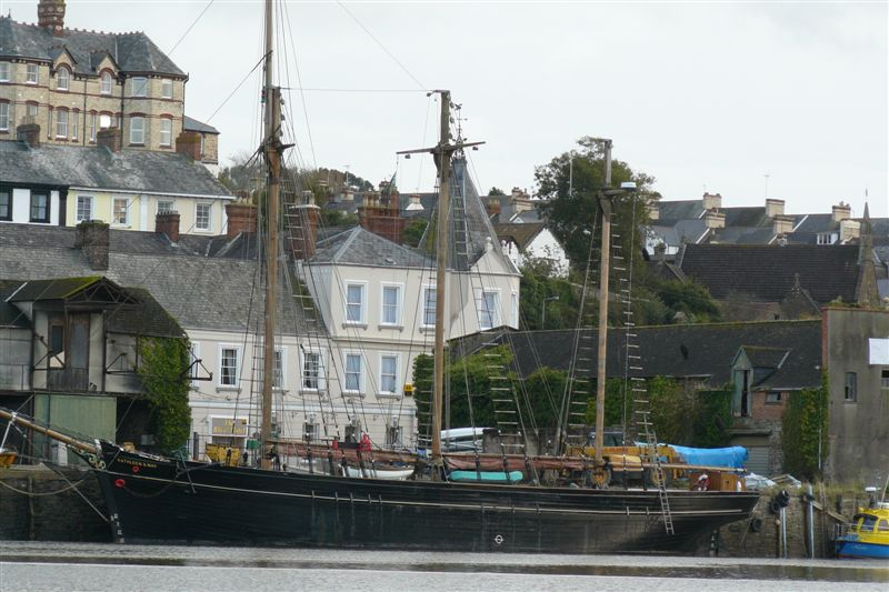 Trois-mâts goélette à hunier Kathleen & May